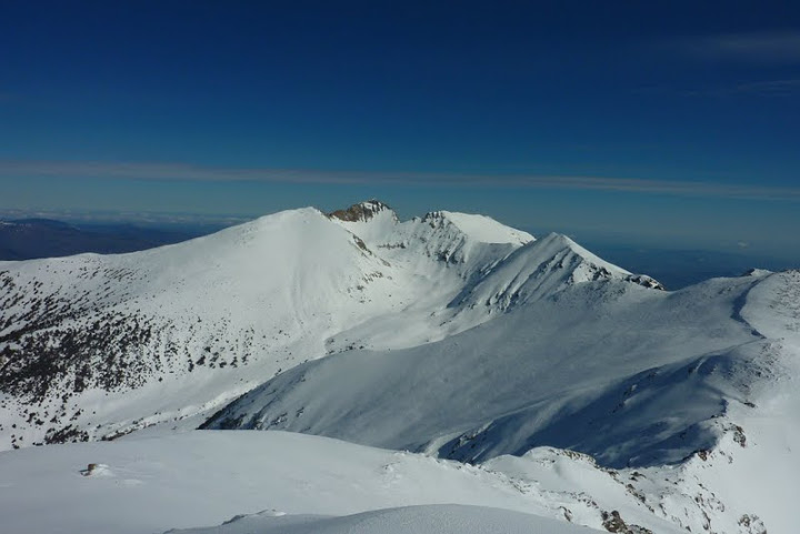 Canigou et Puig Sec